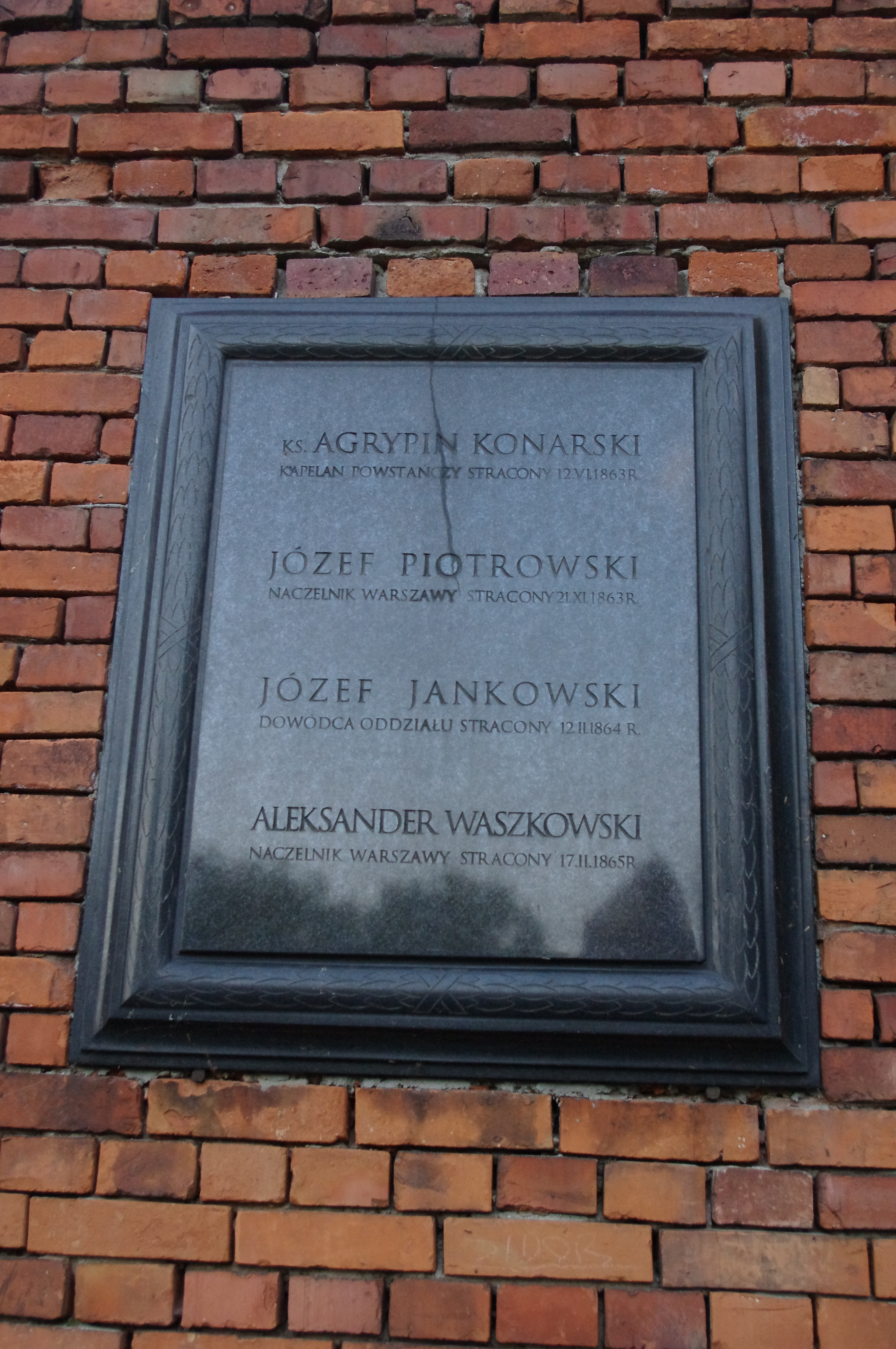 Tablica wmurowana w ścianę Cytadeli Warszawskiej tuż za szczątkami szubienicy, na której w okresie zaborów ginęli bojownicy o wyzwolenie narodowe i przemiany społeczne. Tablica upamiętnia ważnych przywódców i działaczy powstańczych straconych w Cytadeli: kapelana powstańczego Agrypina Konarskiego (stracony 12 czerwca 1863), członka Rządu Narodowego i naczelnika Warszawy - Józefa Piotrowskiego (stracony 21 listopada 1863), dowódcę oddziału powstańczego Józef a Jankowskiego (stracony 12 lutego 1864) oraz ostatniego powstańczego naczelnika Warszawy - Aleksandra Waszkowskiego (stracony 12 lutego 1865).